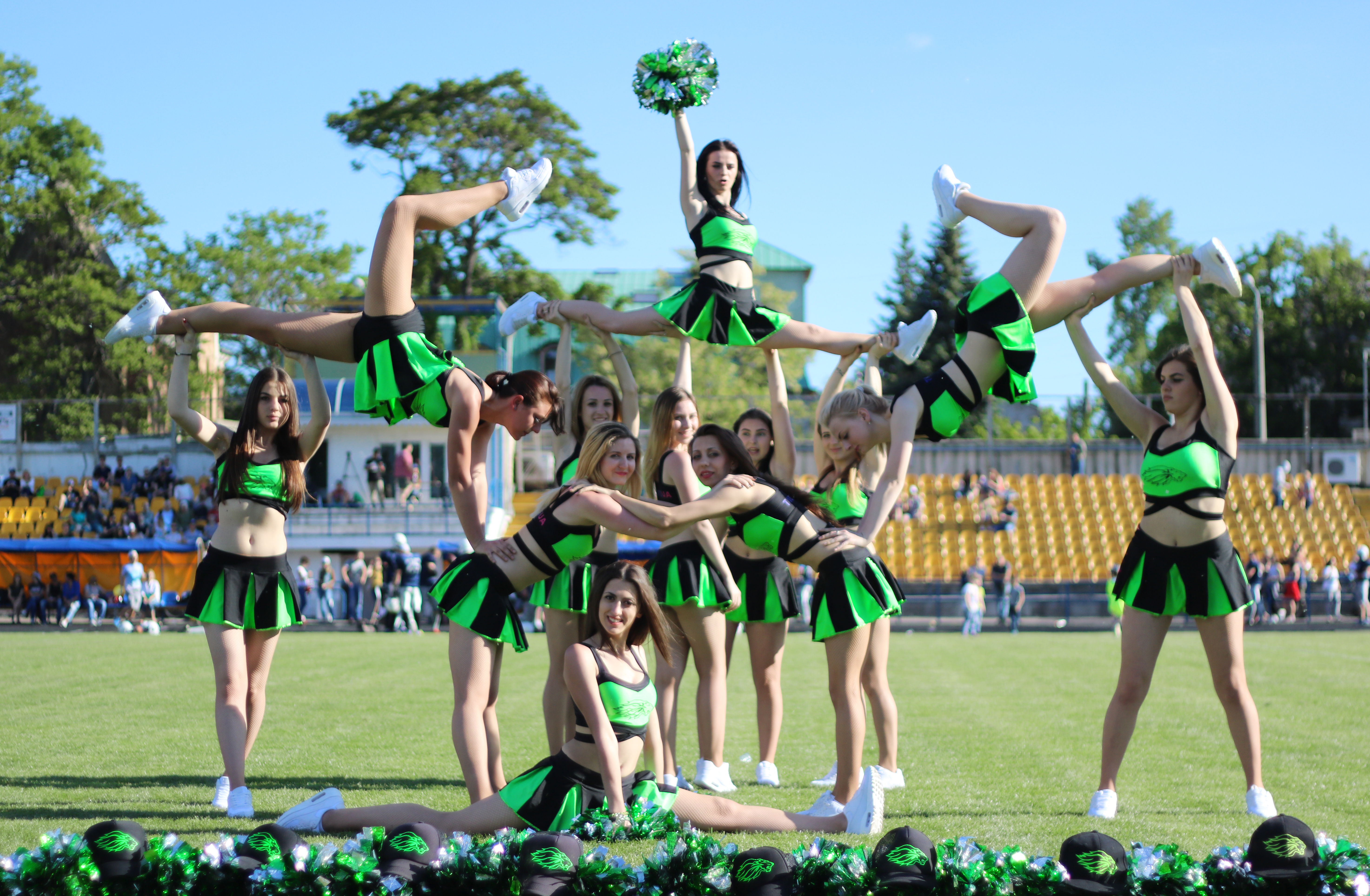 Черлідери команди Lviv Lions